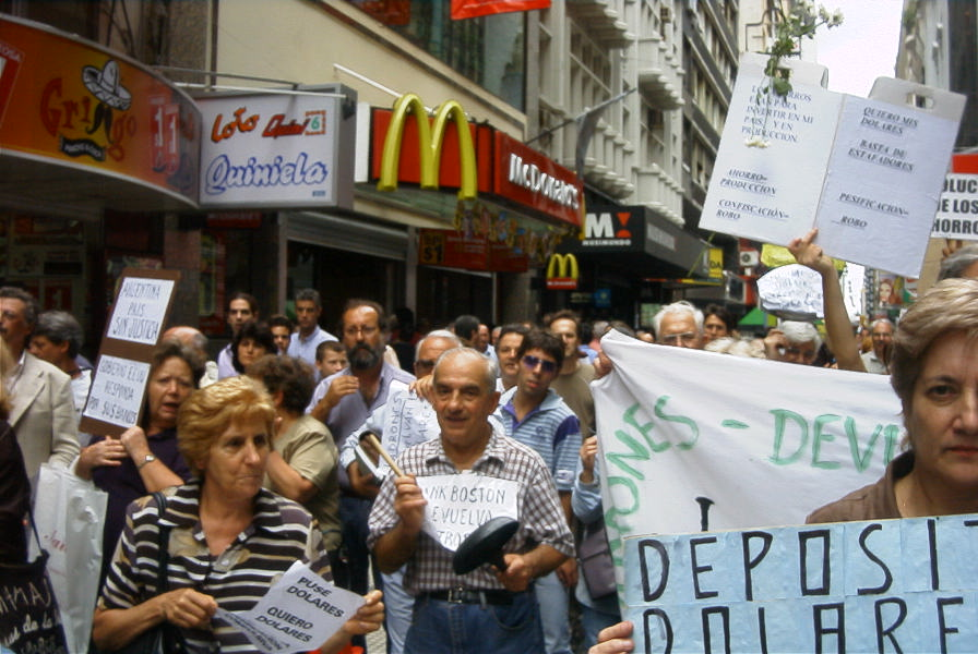 Manifestación de ahorristas argentinos contra el Corralito financiero por la calle Florida, Buenos Aires, Argentina.